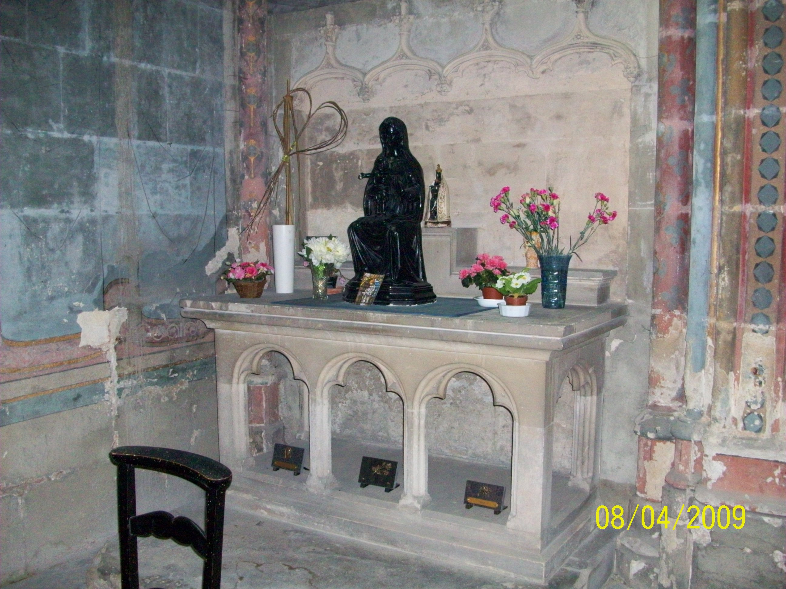 Notre dame de Liesse photographiée à la basilique de Saint-Quentin Aisne.